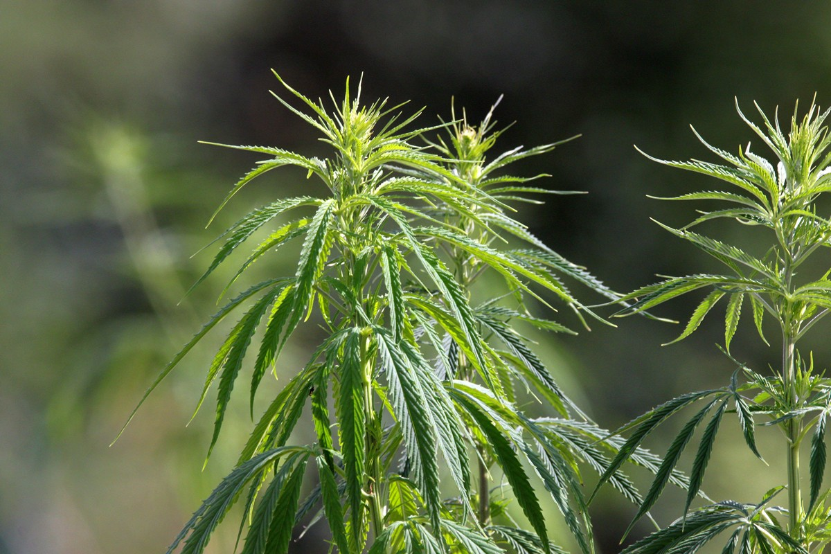 industrieller Hanf